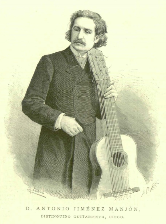 Antonio Jiménez Manjón, distinguido guitarrista, ciego.